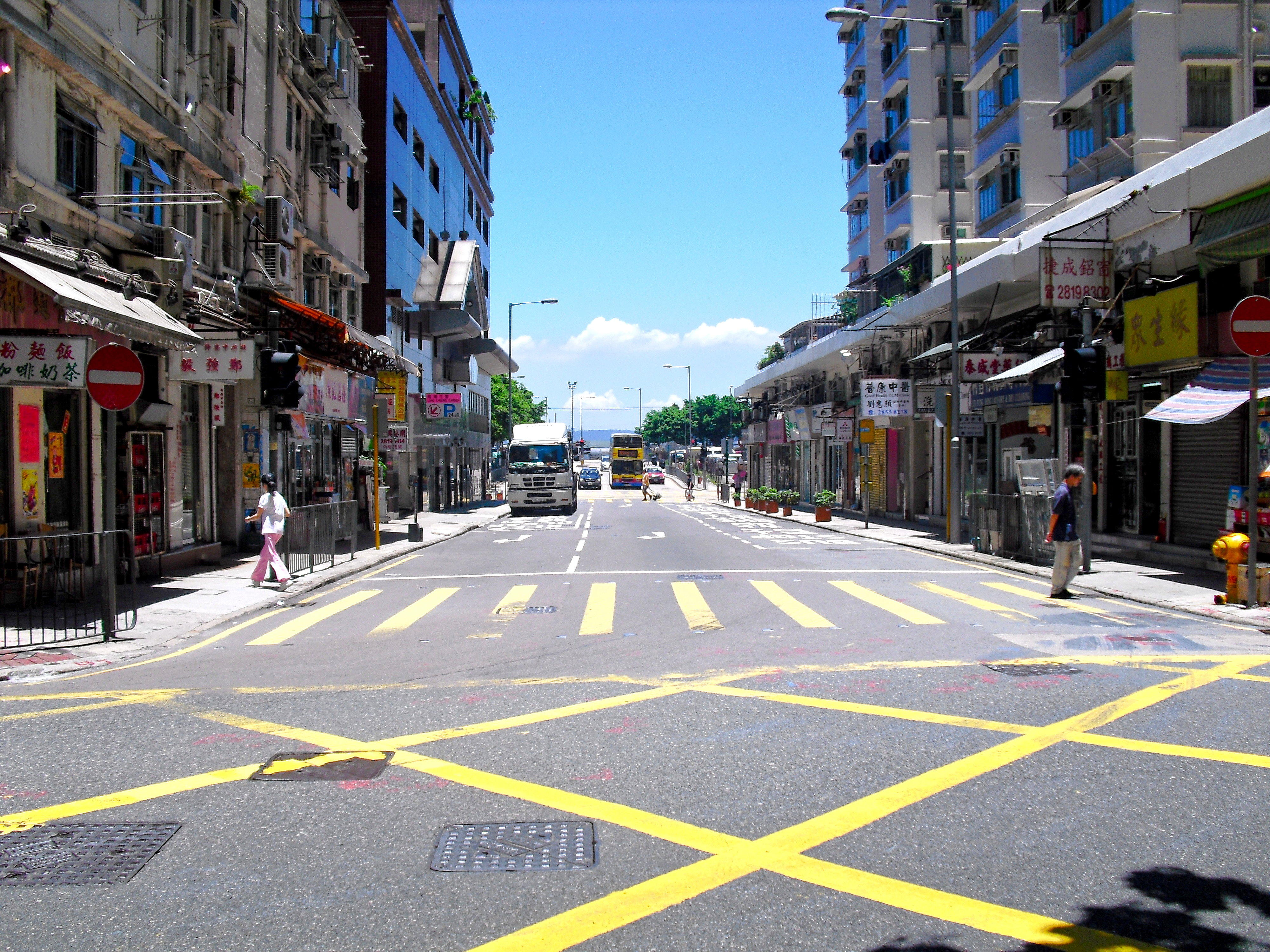 西祥街